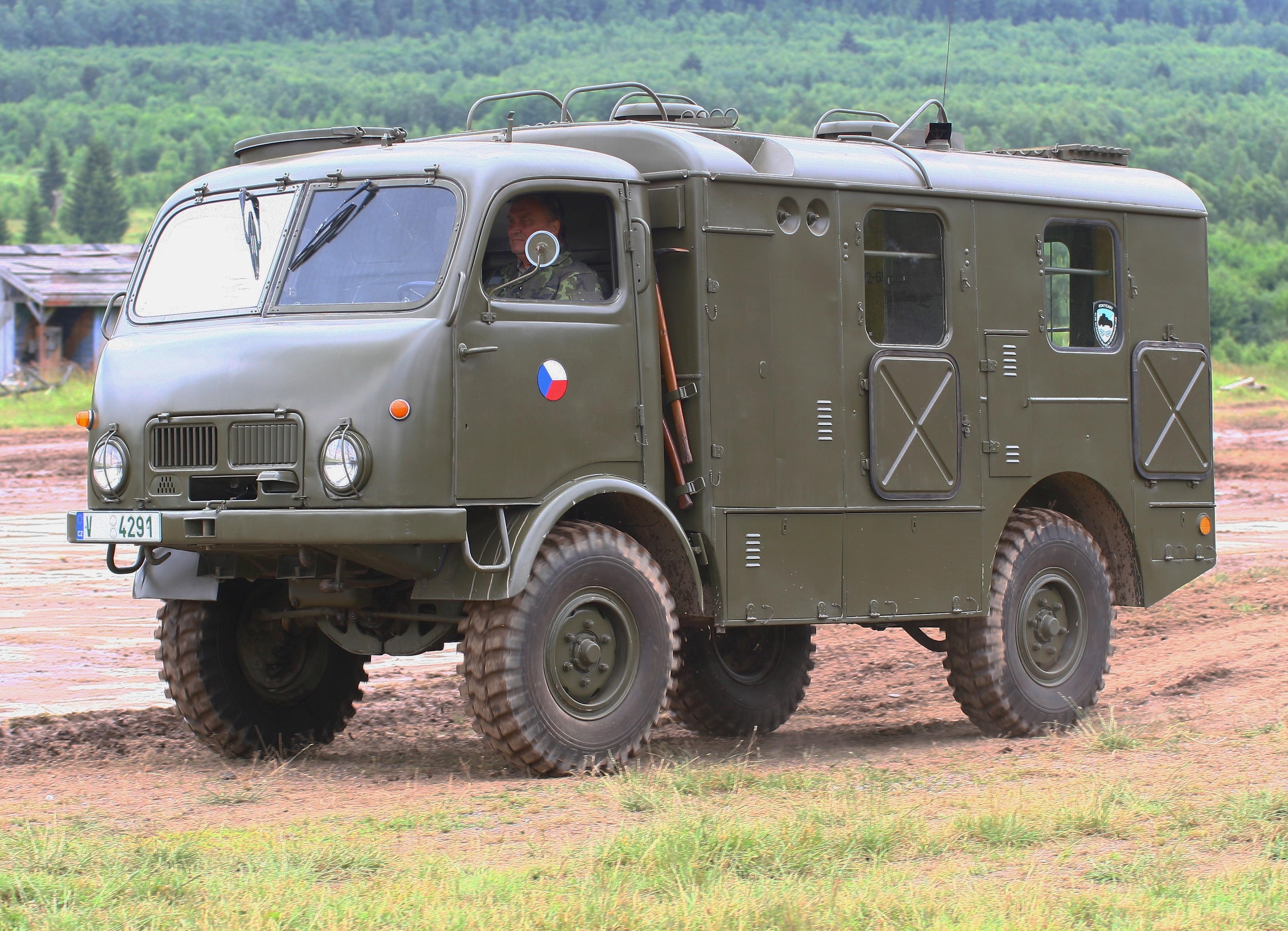 Vojenská technika zaznamenaná při dynamických ukázkách na Dni pozemního vojska BAHNA 2018, který pořádá Velitel společných sil a Nadace pozemního vojska AČR.